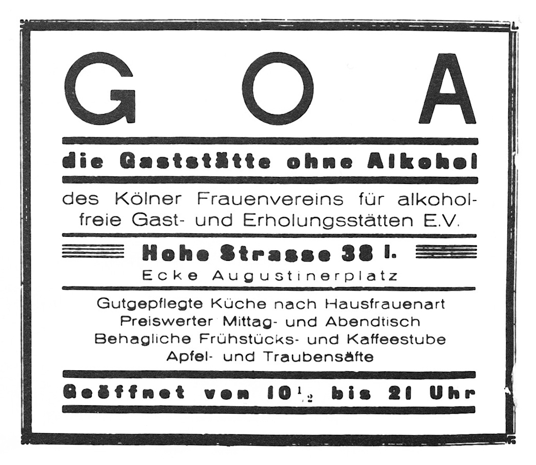 Anzeige für GOA (Gaststätte ohne Alkohol), Köln 1929